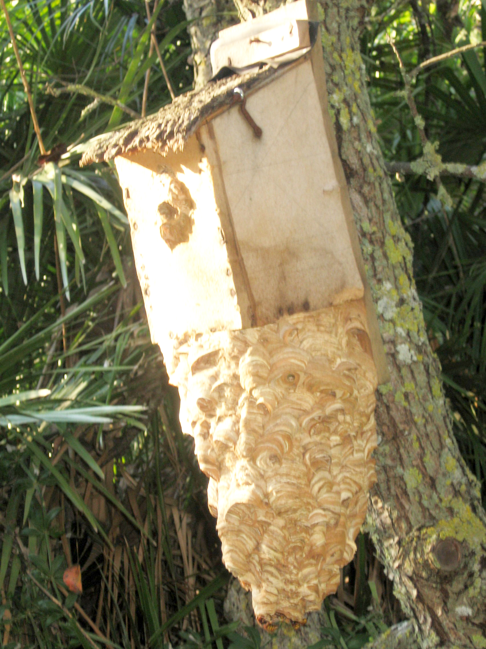 Nidus autumanlis Vespae crabronis factus esse in nidus artificialis alitum.